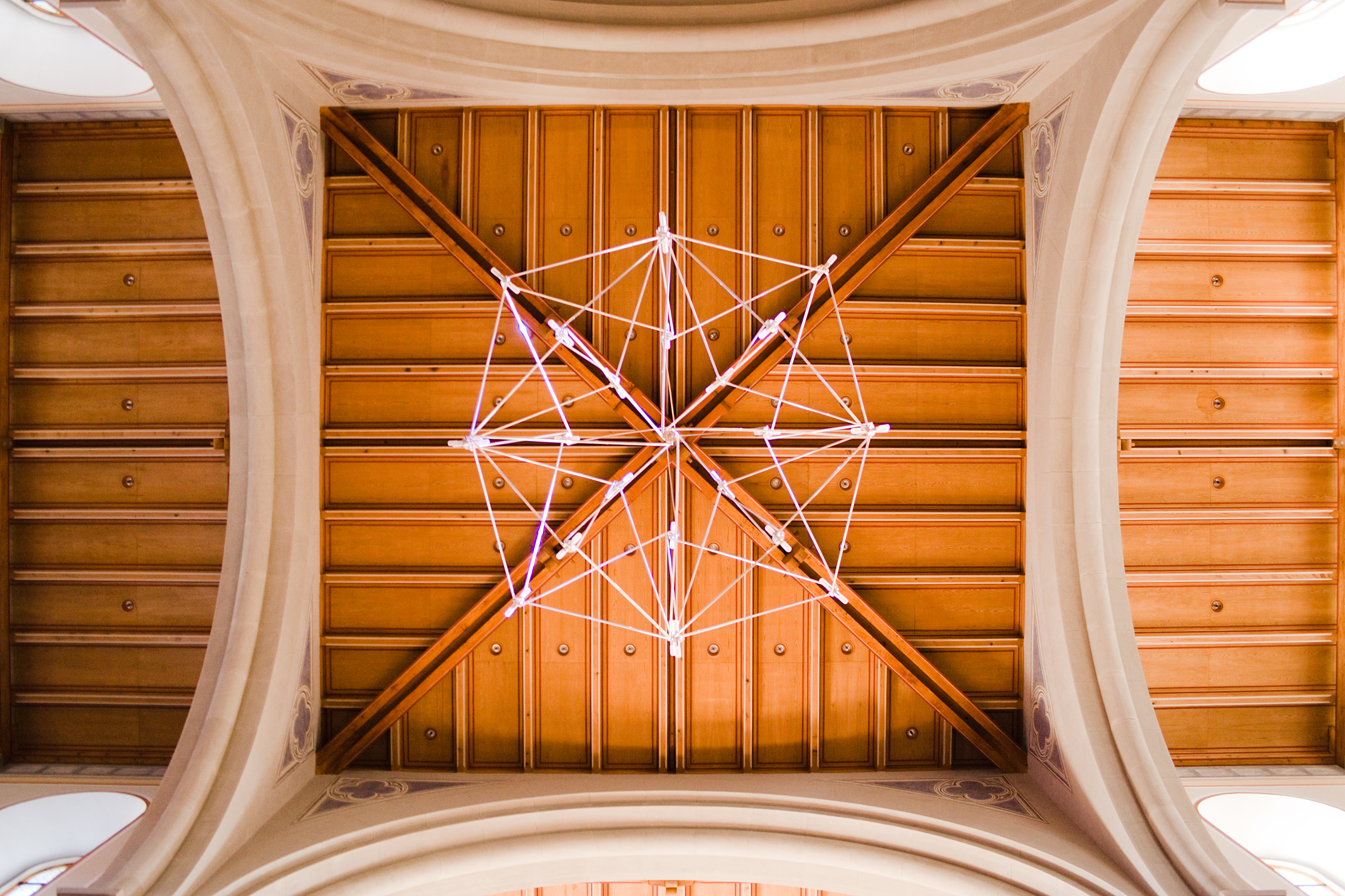 Die Decke der Stadtkirche Glarus in der Vierung, Schweiz